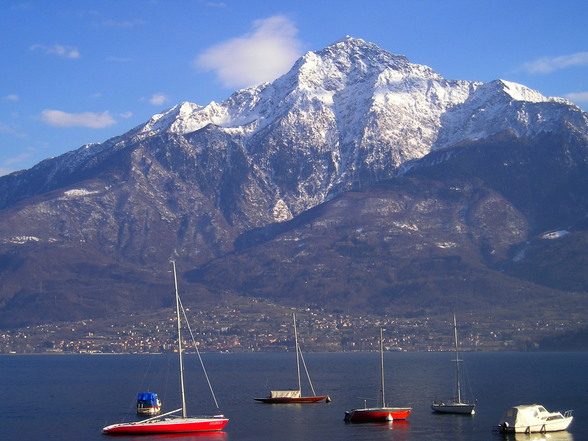 Il Monte Legnone ripreso da Domaso (CO), villaggio posto sulla riva occidentale del Lario. Massimo Macconi